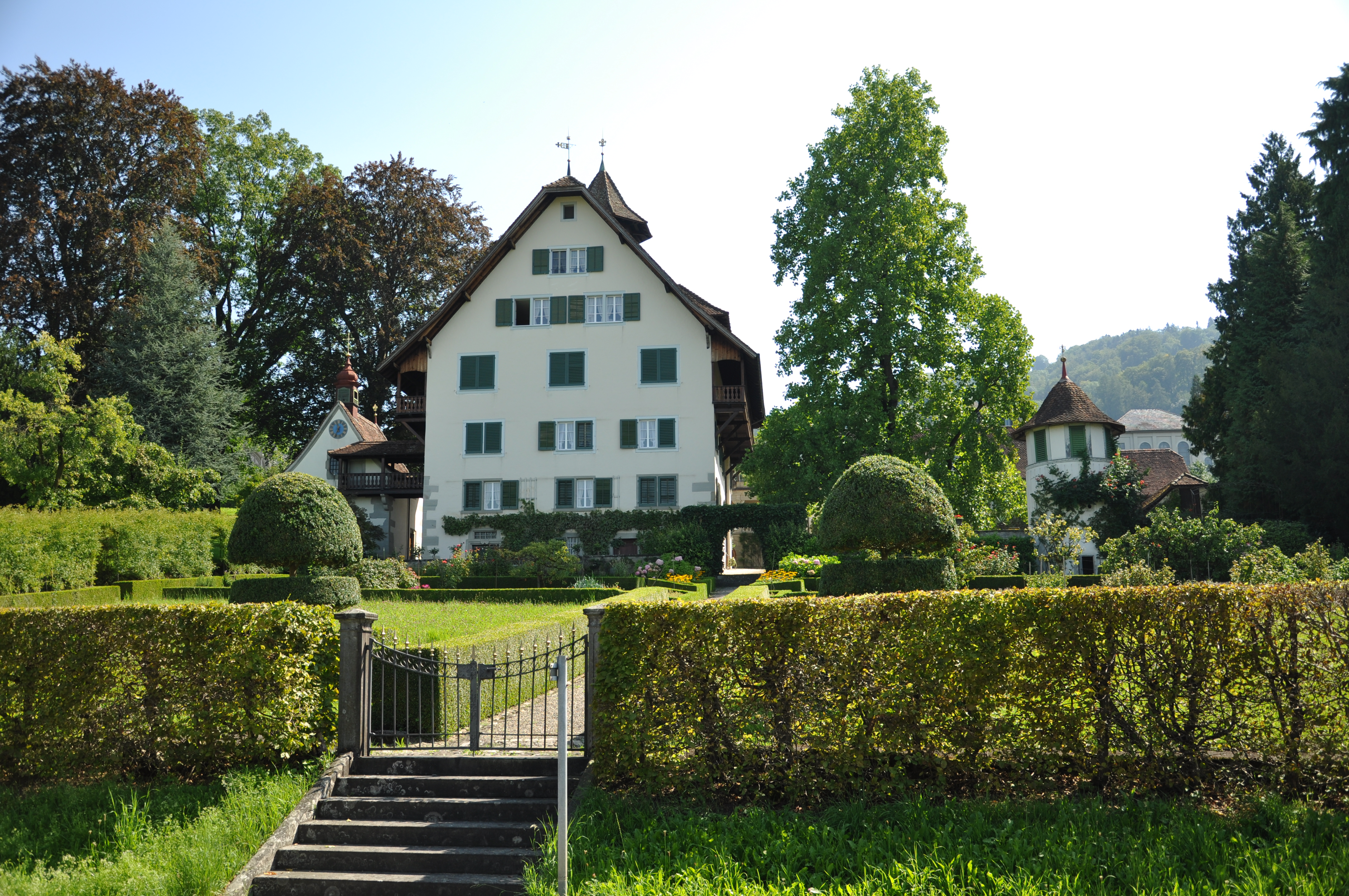 Zug Zurlaubenhof